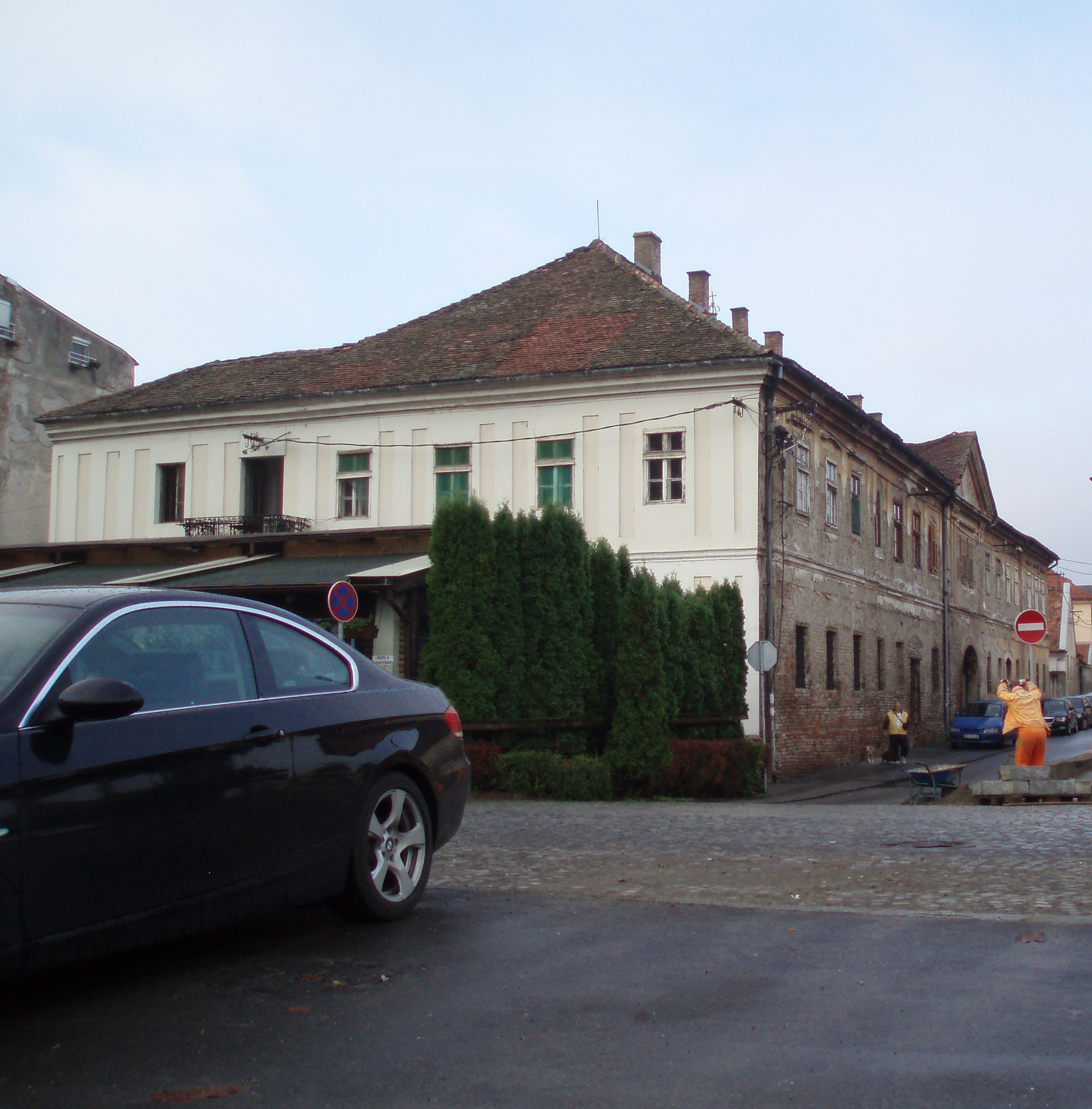 Zgrada Dunavske carinarnice u Zemunu Zmaj Jovina 26 sagrađena 1781. godine, Autor:Nicolo